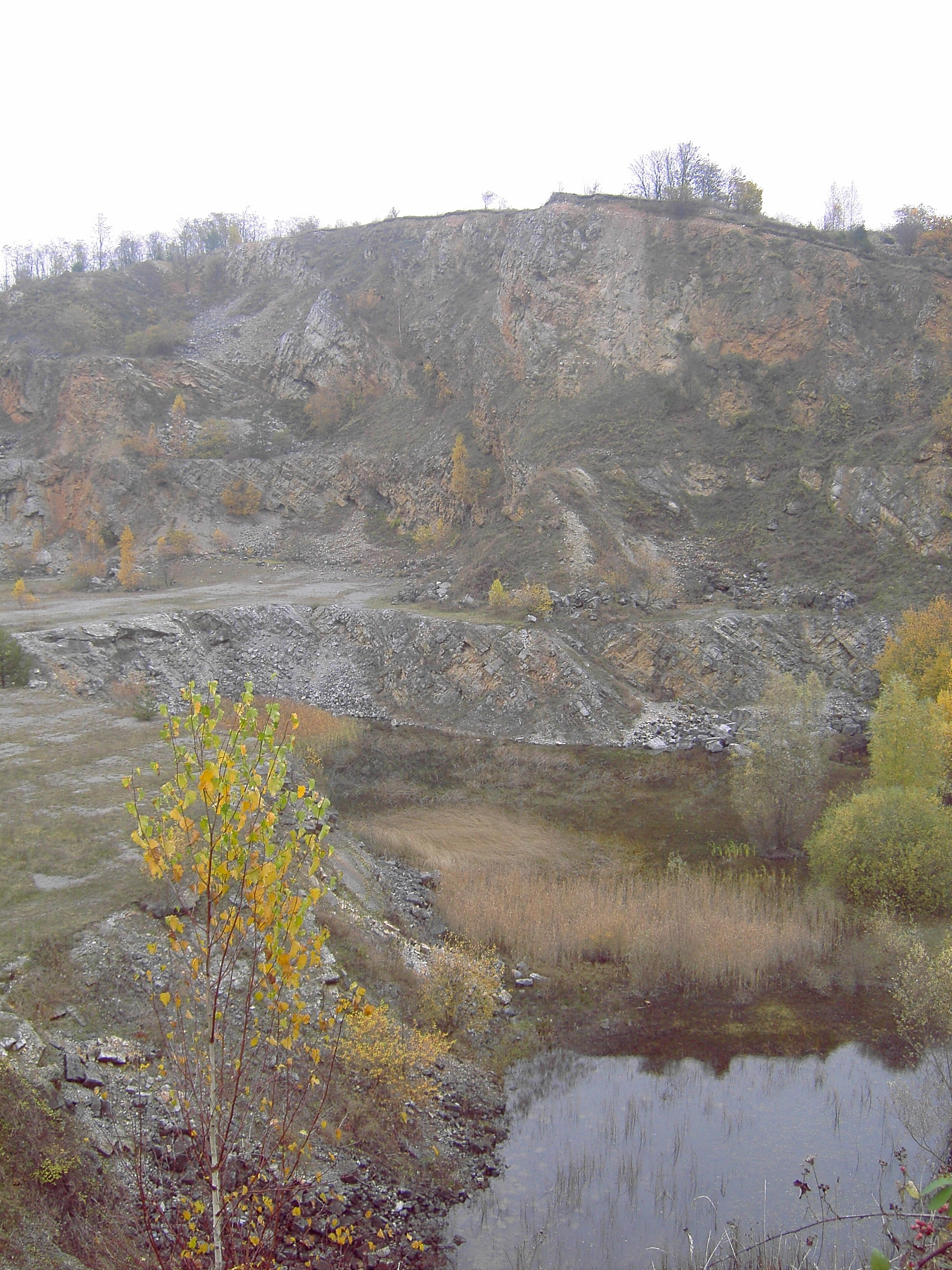 Blick in den Steinbruchbereich